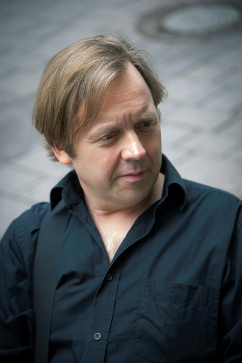 Zeigt Wolfgang Vielsack